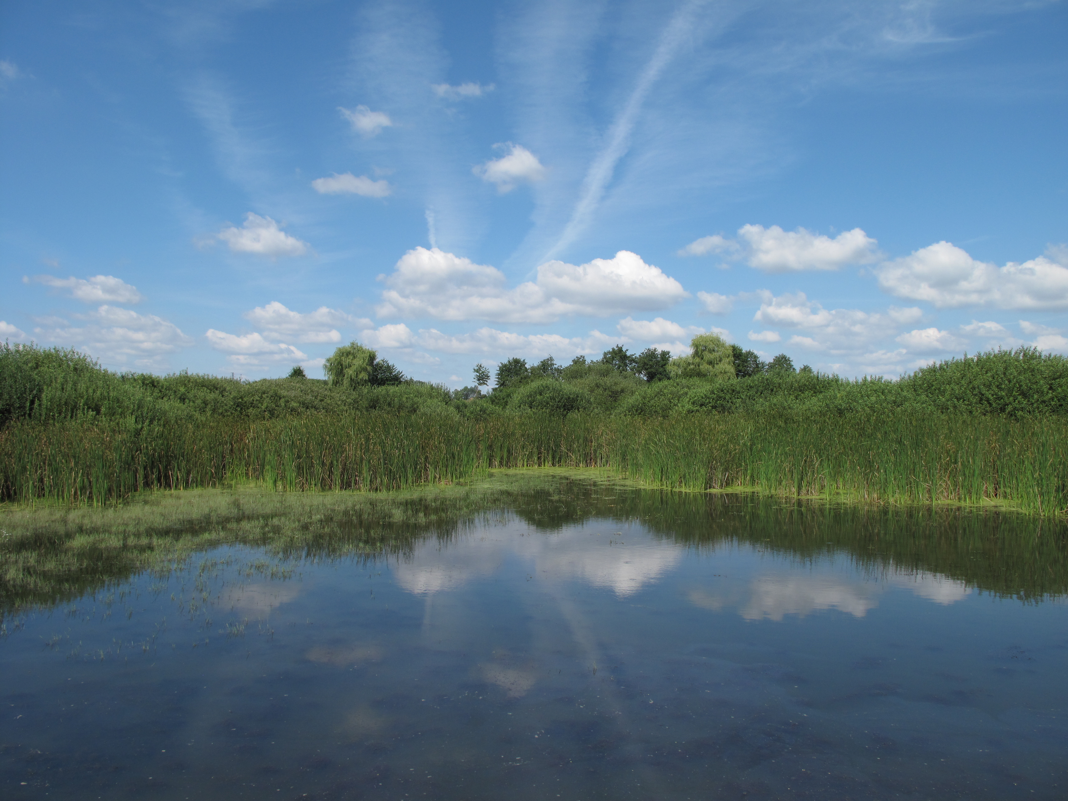 Kamenitý rybník. Okres Písek, Česká republika.